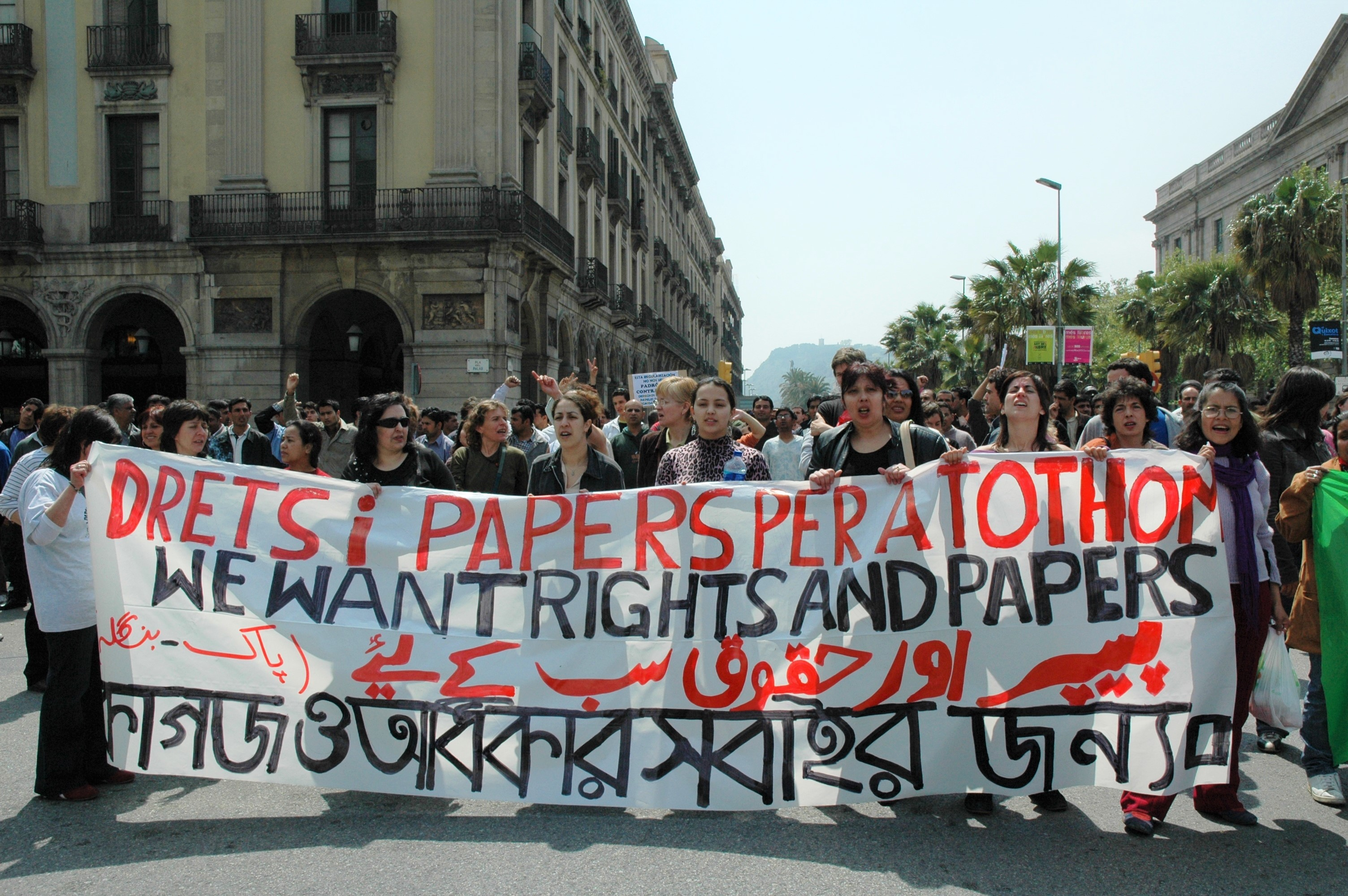 any 2001, dones de moltes nacionalitats al tancament de dones a l´església de Sant Pau